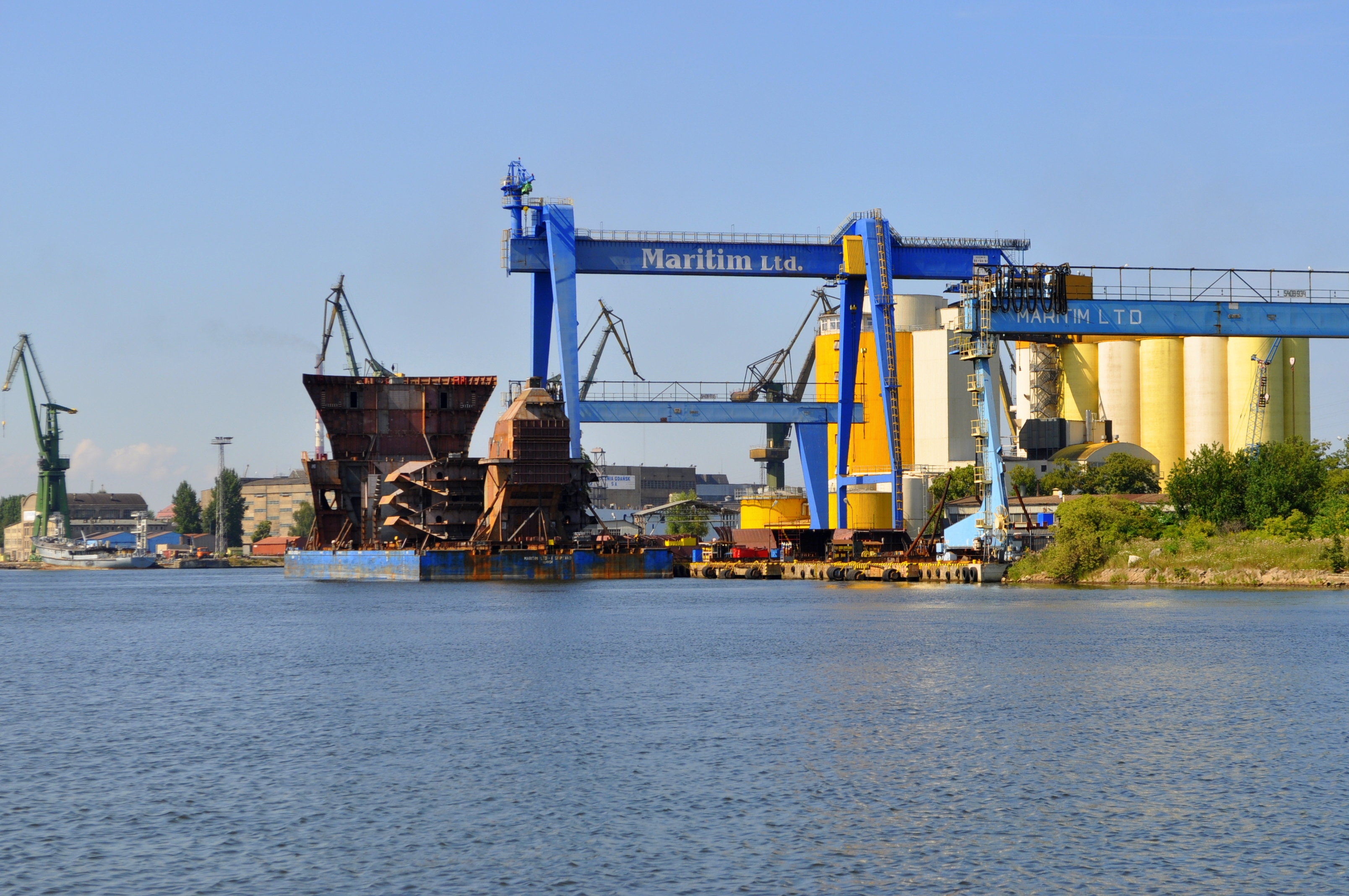 Gdańsk. Martwa Wisła i Przeróbka, stocznia Maritim Ltd.